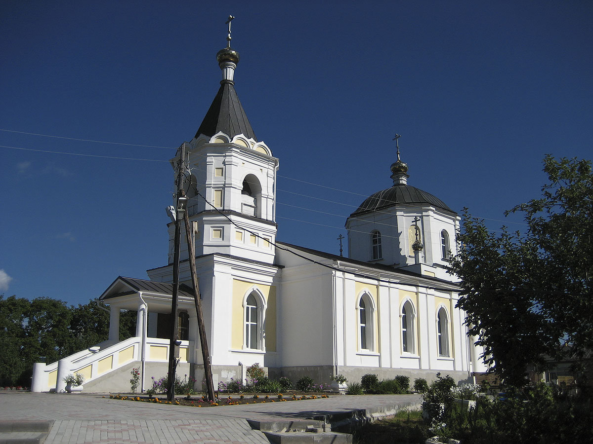 Церковь Покрова Богородицы (Нижегородская область, Богородск, село Лукино)